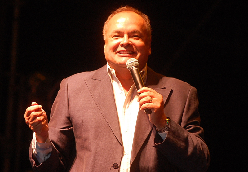 Álvaro Reinaldo Salas Carvajal (*Valparaíso, 27 de diciembre de 1952), es un humorista y presentador de televisión chileno.